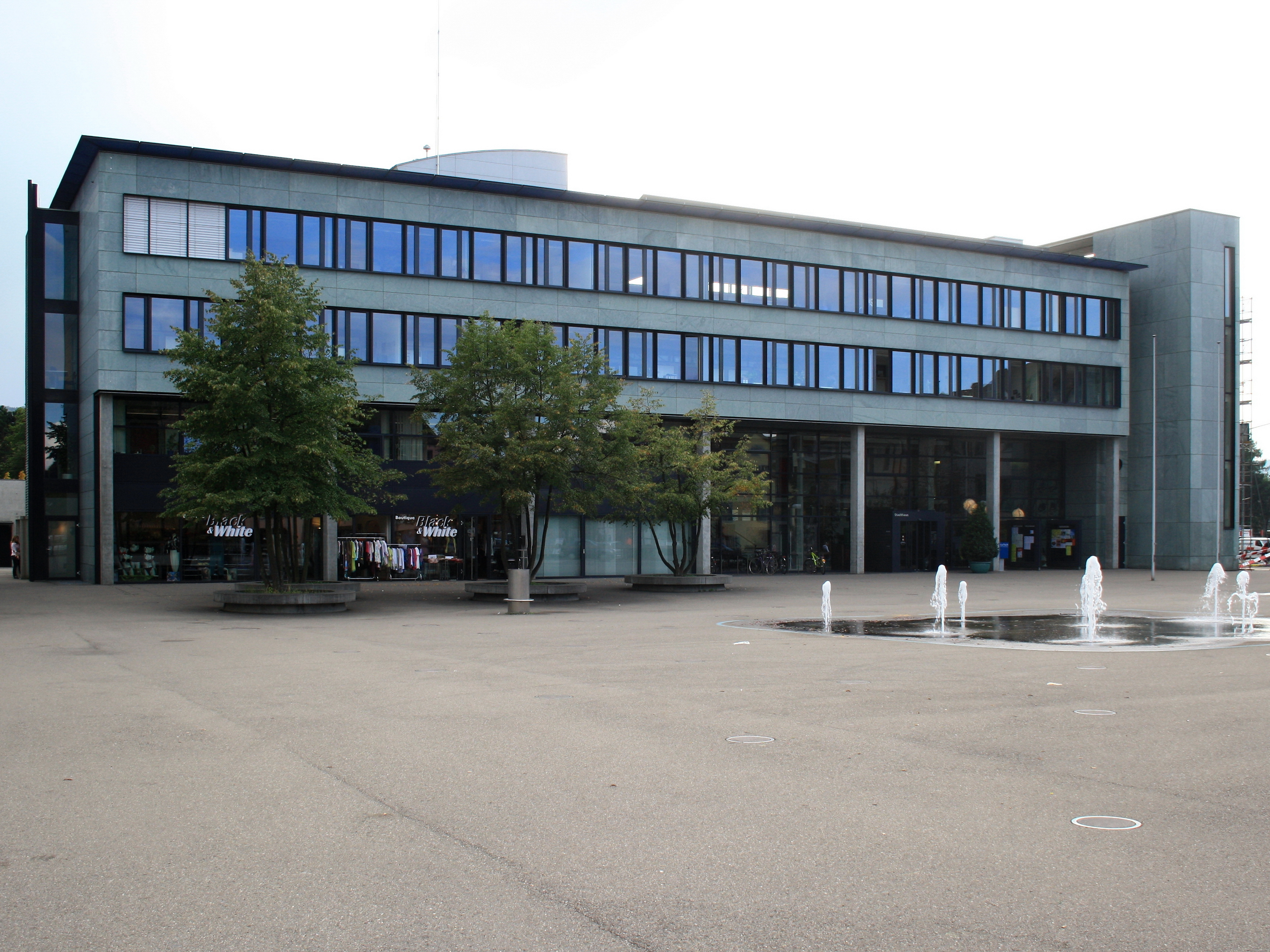 Stadthaus in Dübendorf (Switzerland)